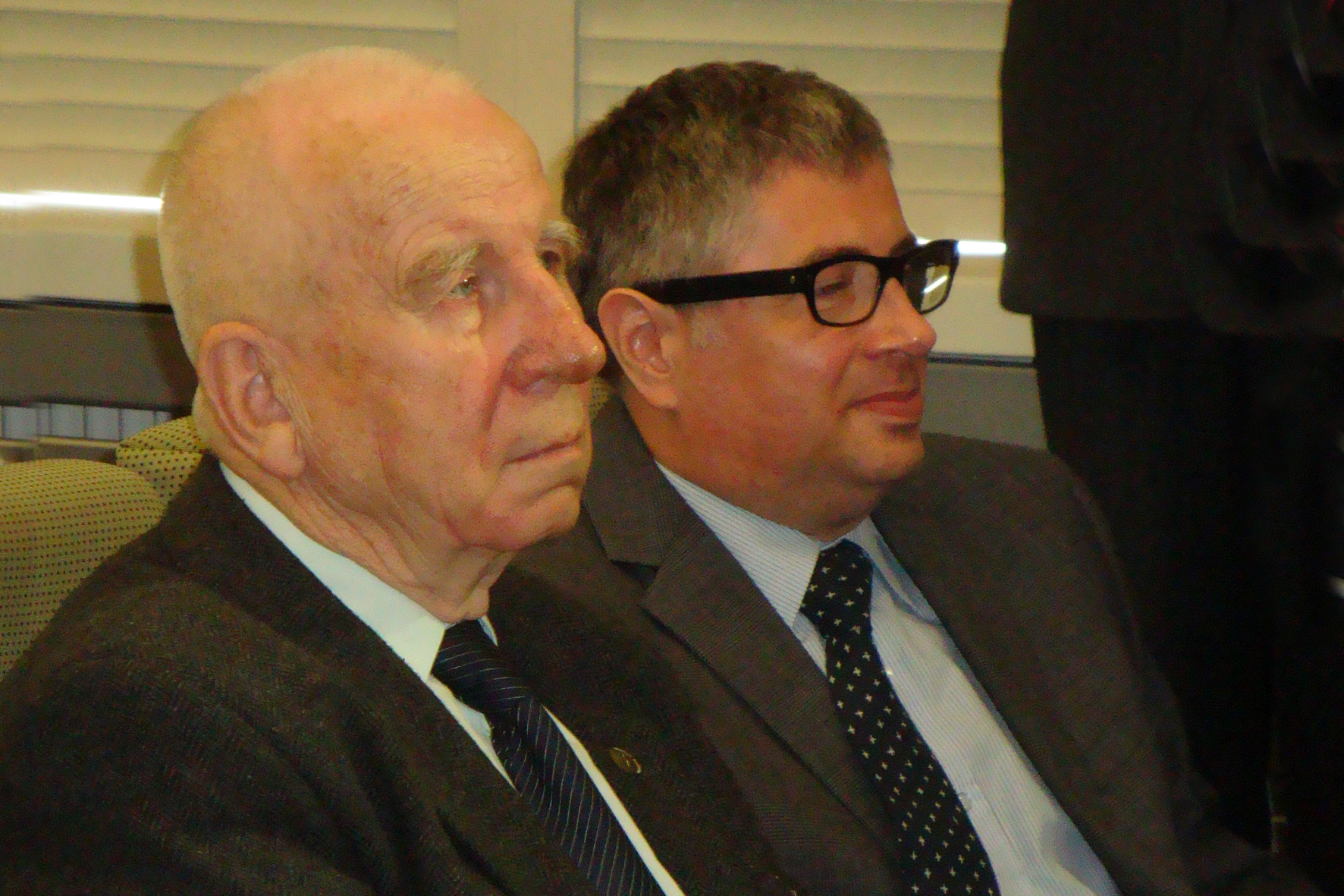 Andrzej Ruszkowski (Sieradz) i Andrzej Machejek (Łódź) Laureaci Złotego Ekslibrisu Książnicy Miejskiej Wojewódzkiej Biblioteki Publicznej w Łodzi MZW 2014